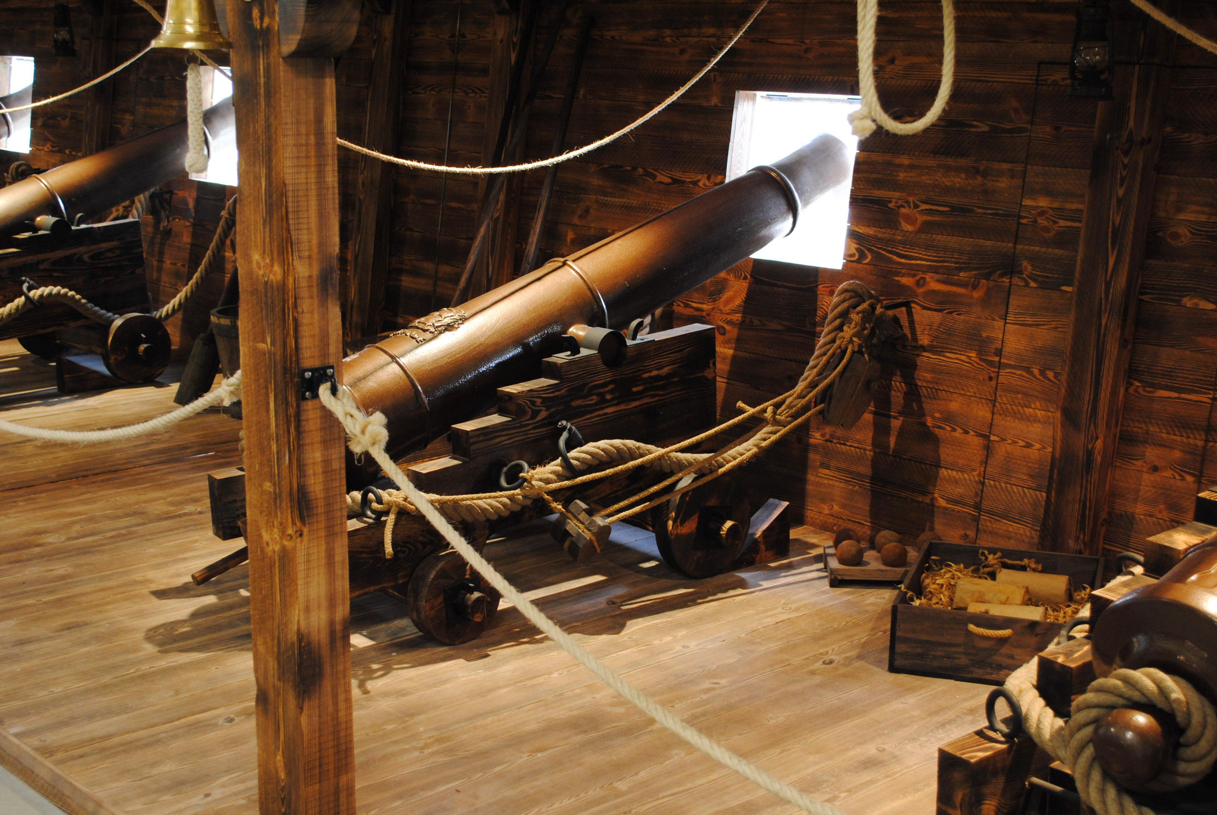 Vexa o título e as categorías